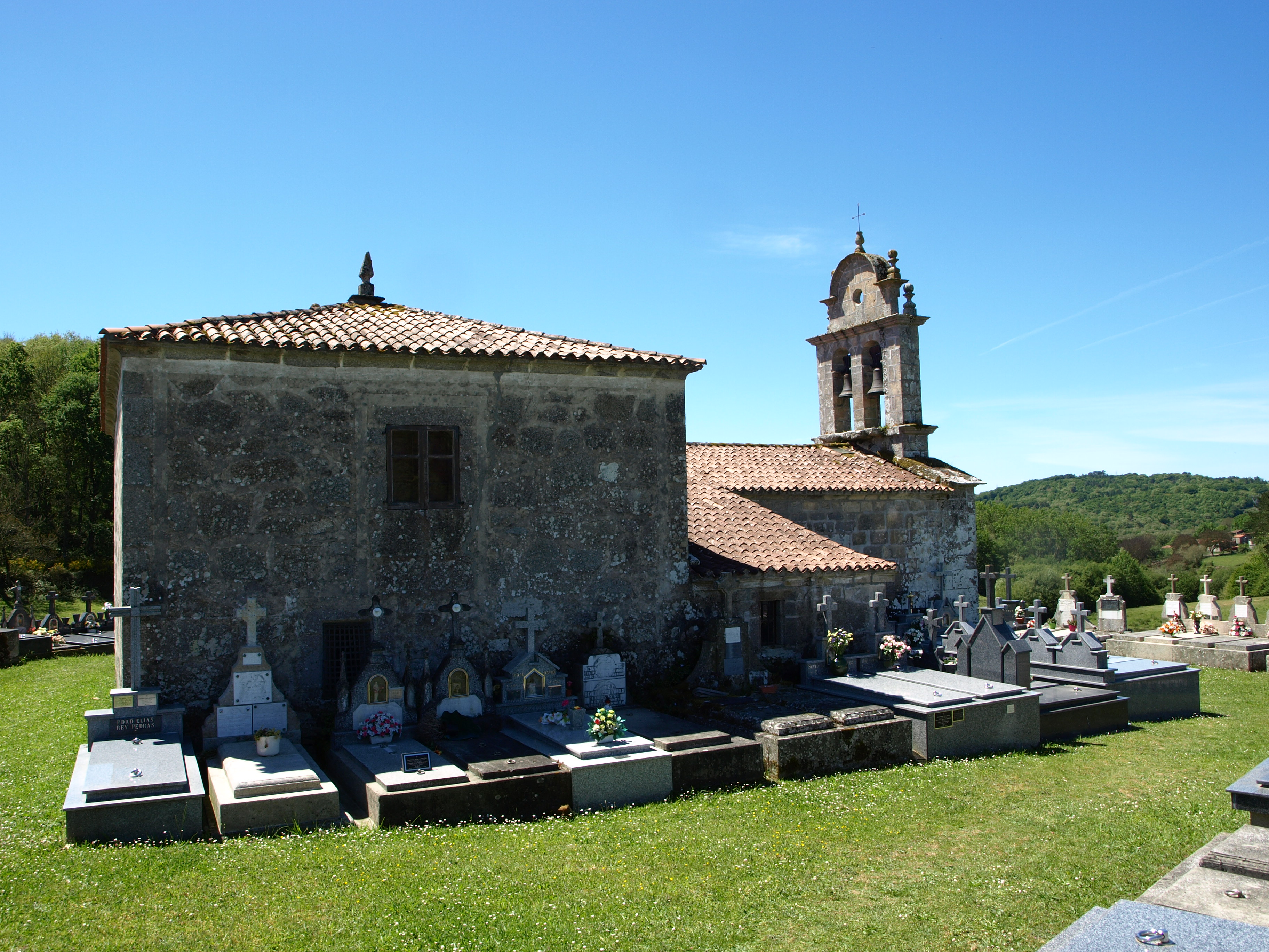 Igrexa parroquial de Vilelos (O Saviñao)